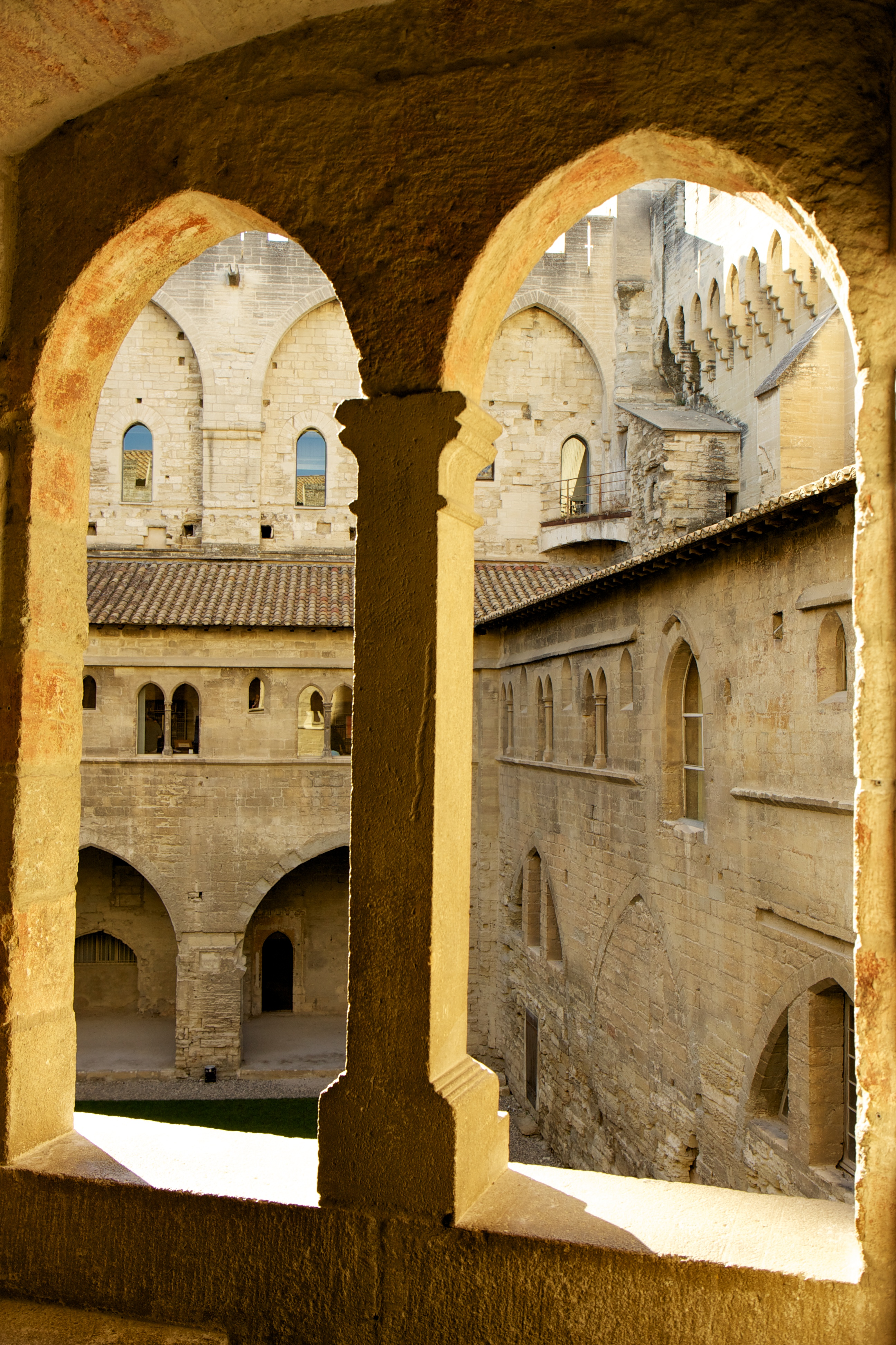 Fenêtre géminée donnant sur la cour d'honneur du palais des papes d'Avignon